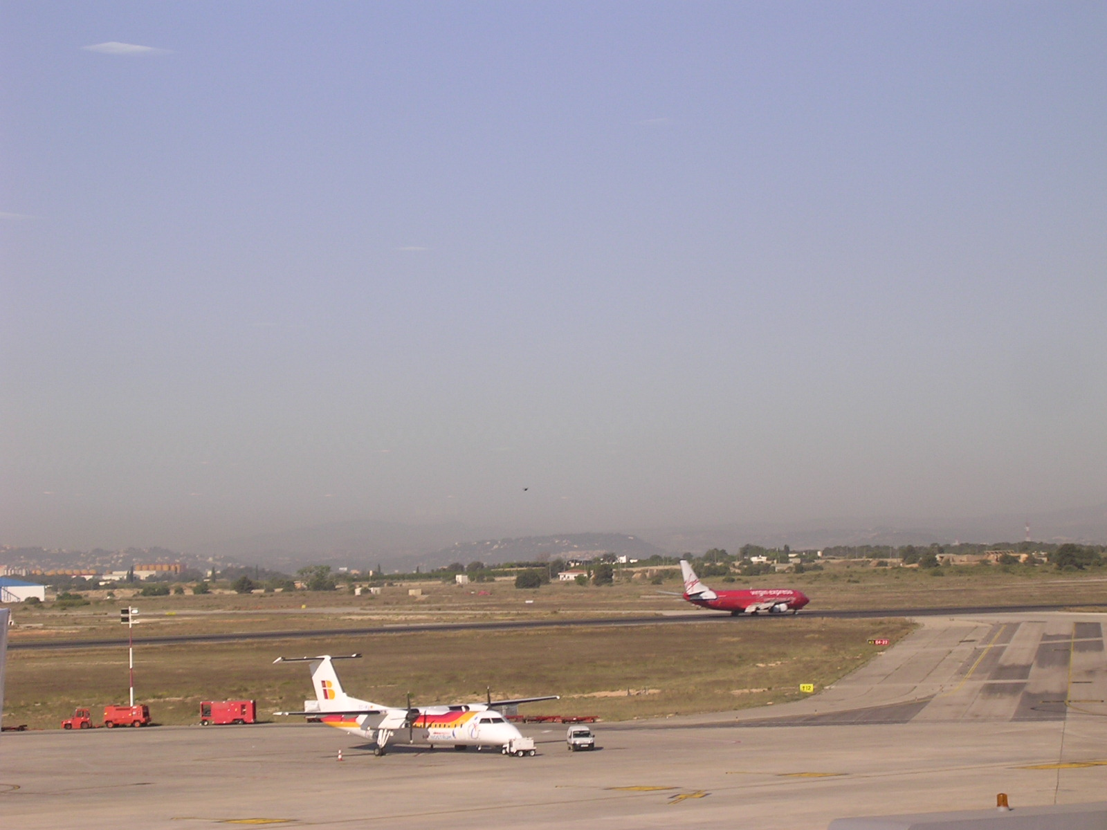 Valencia Airport